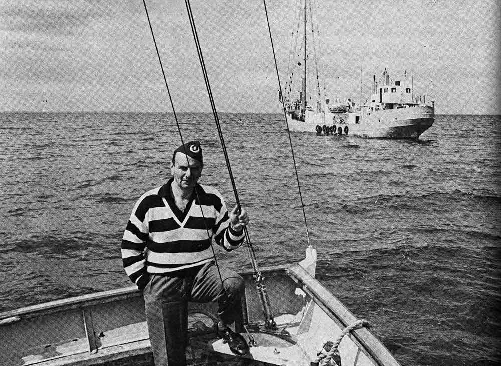 Jack Kotschack på en bild som togs den 30 juni 1962 när han, på Radio Nords sista sändningsdag, besökte sändarfartyget Bon Jour